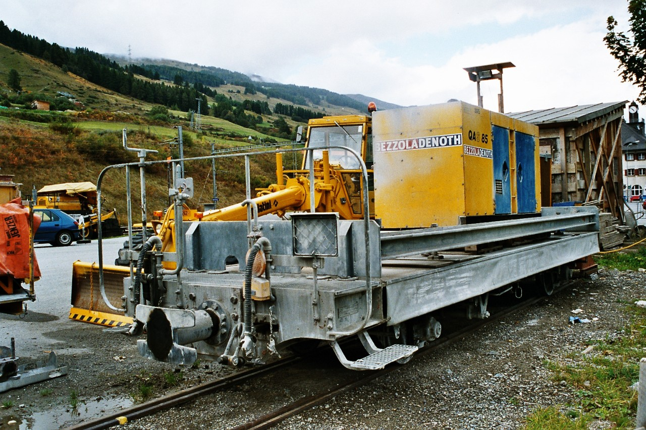 Bau-Privatwagen "Jenzer" in Scuol, umgbaut aus OKK-Kesselwagen von 1948 (SWS-Fabrikschild). Wahrscheinlich ex P 8913 (OKK/SBB Brünig)